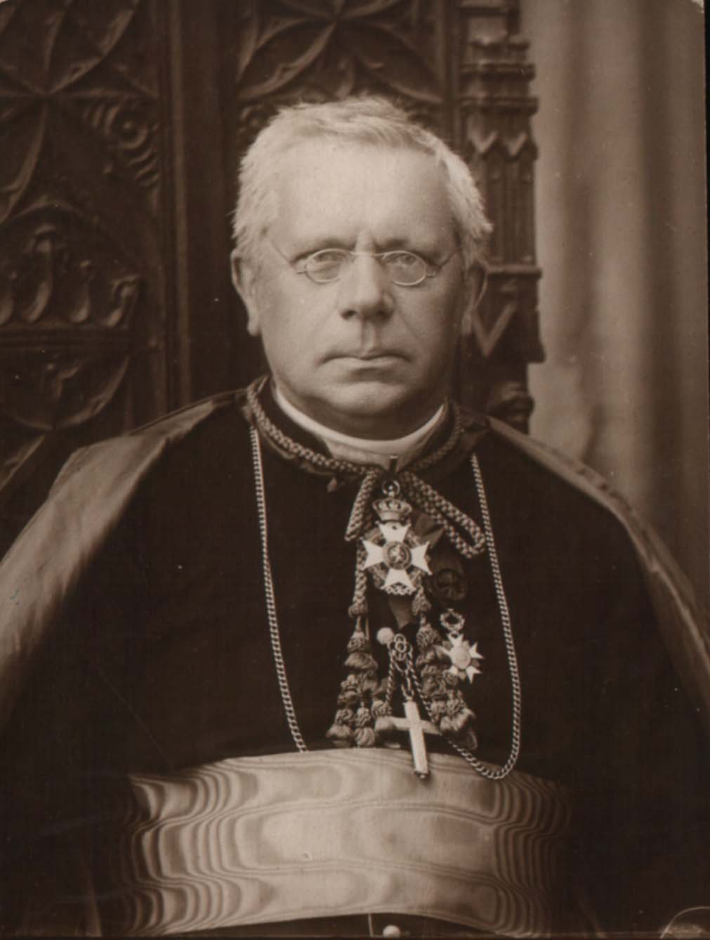 Thomas Louis Heylen (1856-1941) - bisschop van Namen (1899-1941) - provincie Namen - België